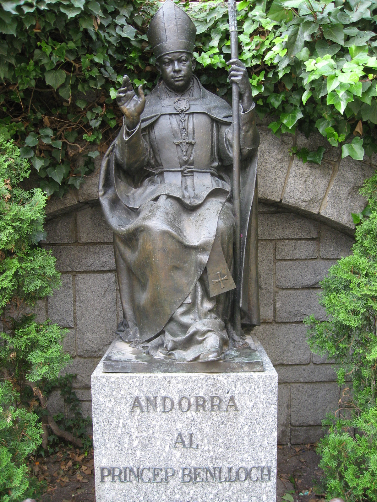 Estatua al Princep Benlloch (Andorra)